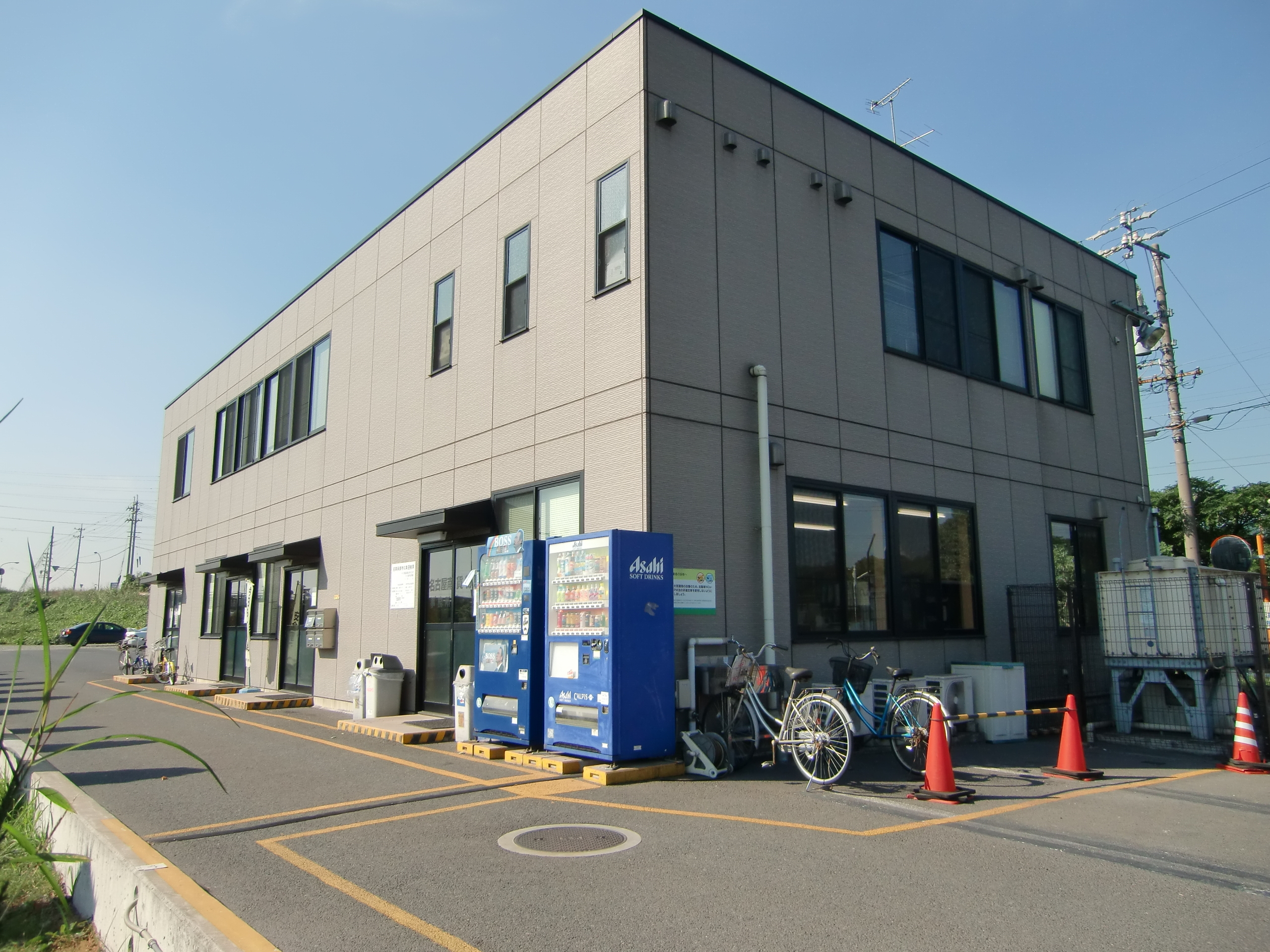 名古屋南駅舎風景。